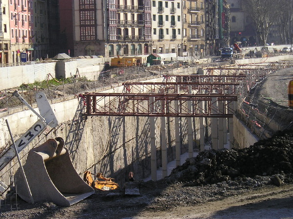 Areatzako aparkalekua.